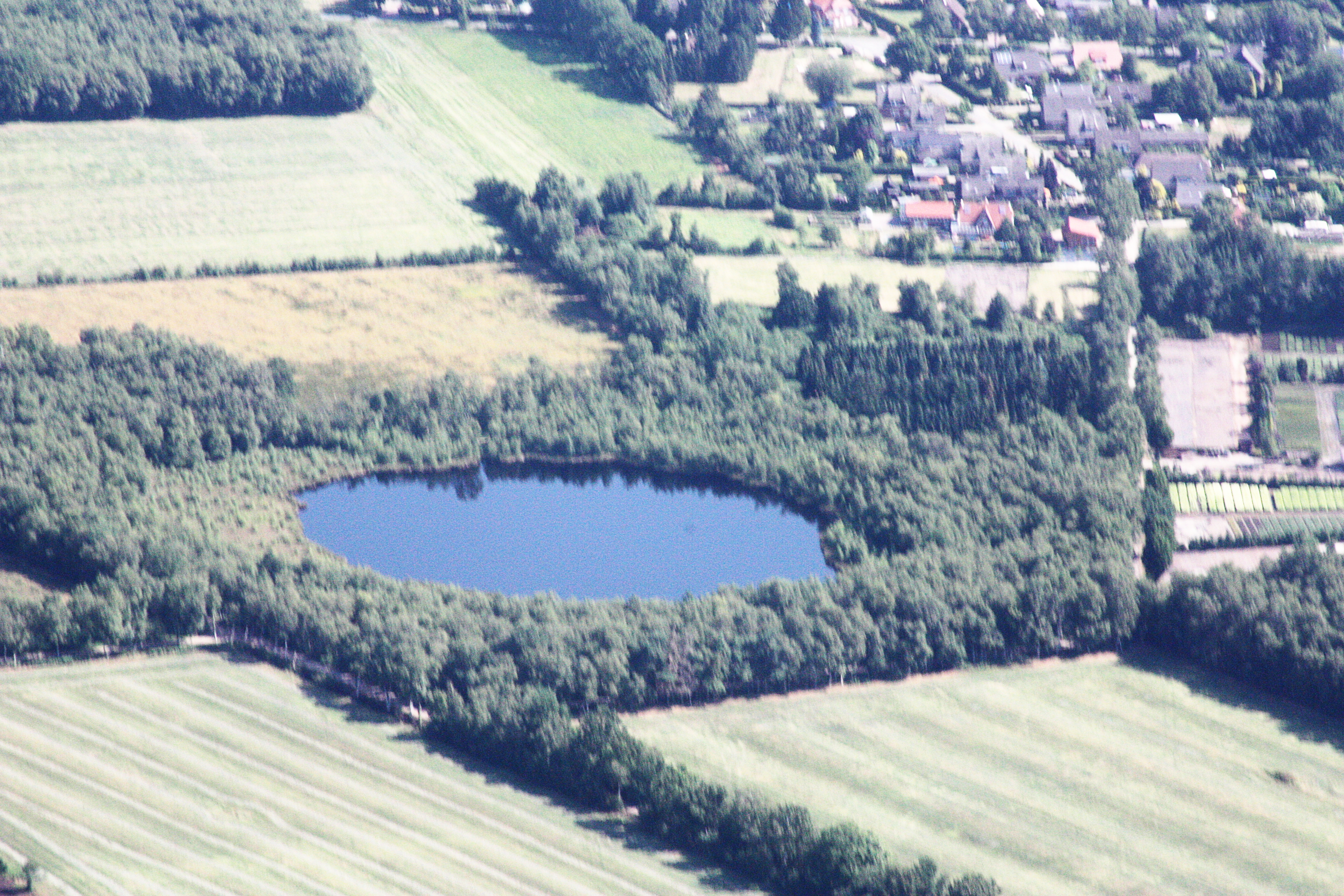 Flug von Oldenburg (Oldenburg) nach Bad Zwischenahn und zur Landesgartenschau ; Flughöhe 1500 ft; Juli 2010; Originalfoto bearbeitet: Tonwertkorrektur und Bild geschärft mit Hochpassfilter